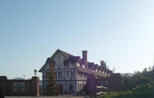 Colegio Santa María de Pirque, private college Pirque, Chile